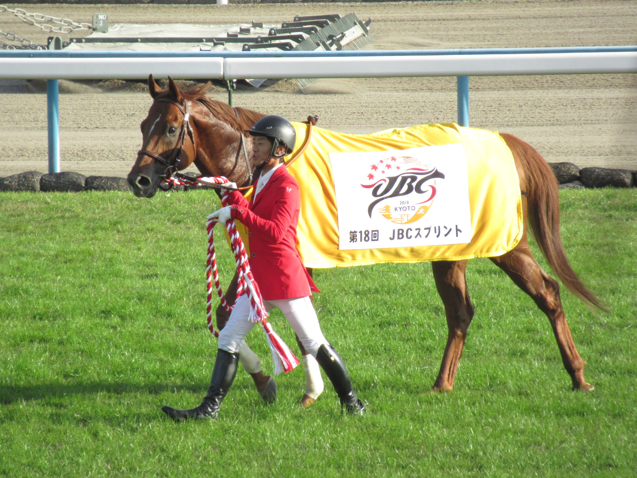 2018年 JBCスプリント優勝馬 グレイスフルリープ号。京都競馬場にて。